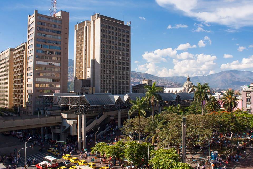 Estación Parque Berrio (Metro de Medellín)